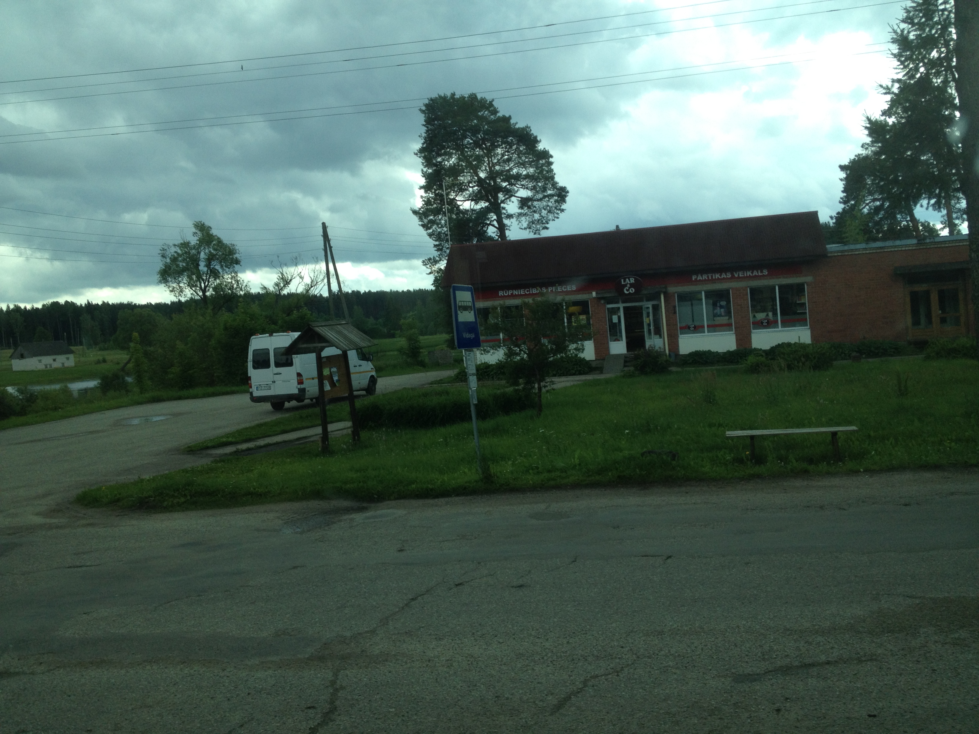 Skats uz Vidagas centru